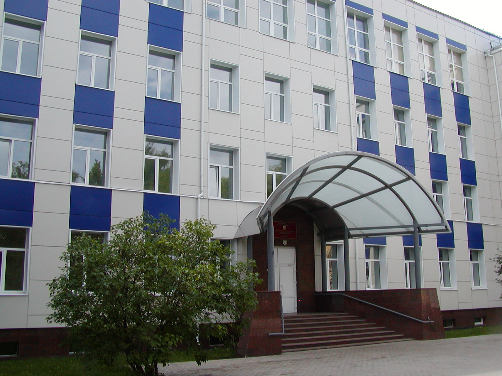 Парадный вход Гимназии города Обнинска.